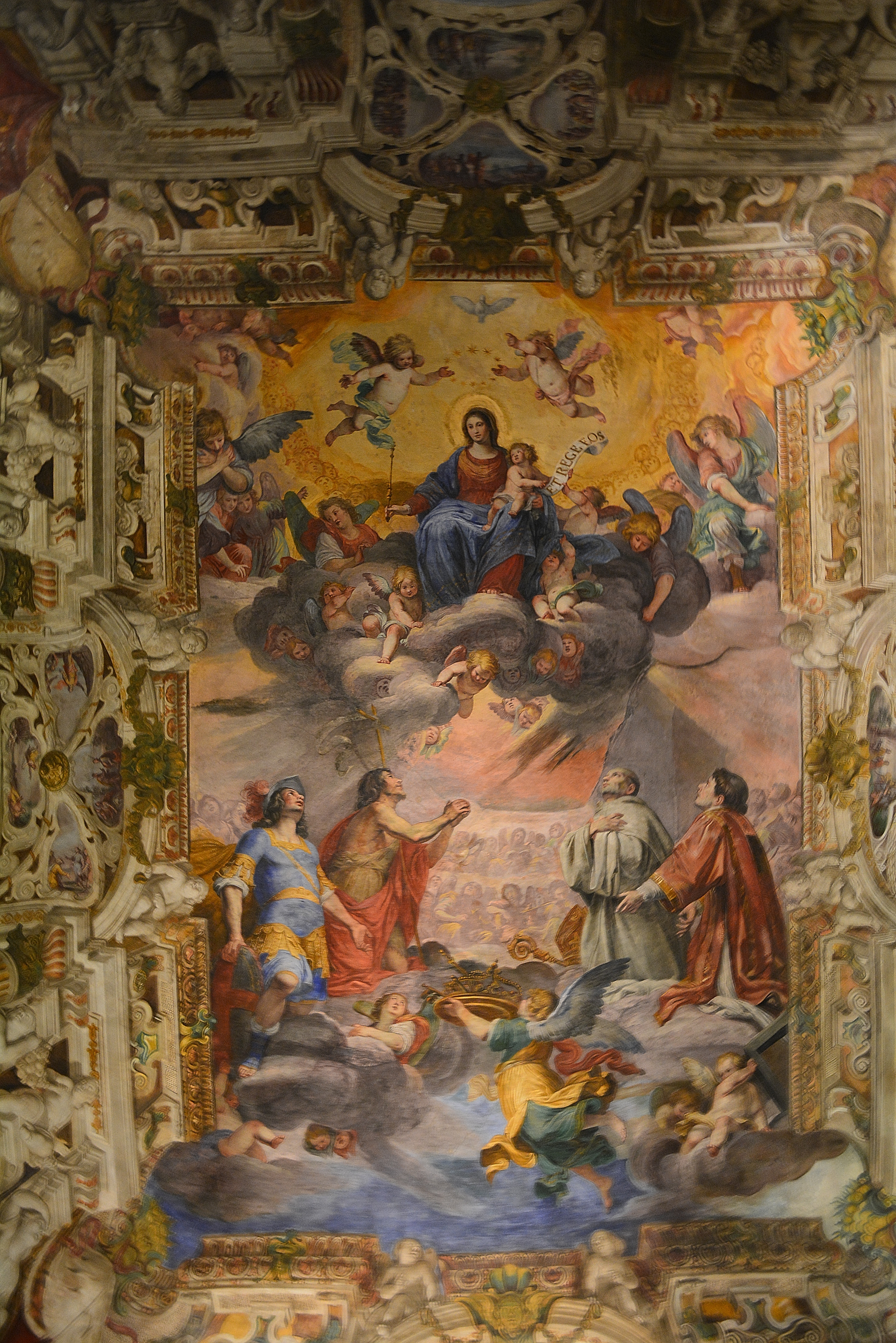 Palazzo Ducale di Genova This is a photo of a monument which is part of cultural heritage of Italy.